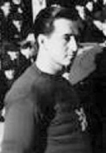 Antonín Houba (1909-1986), český hokejista